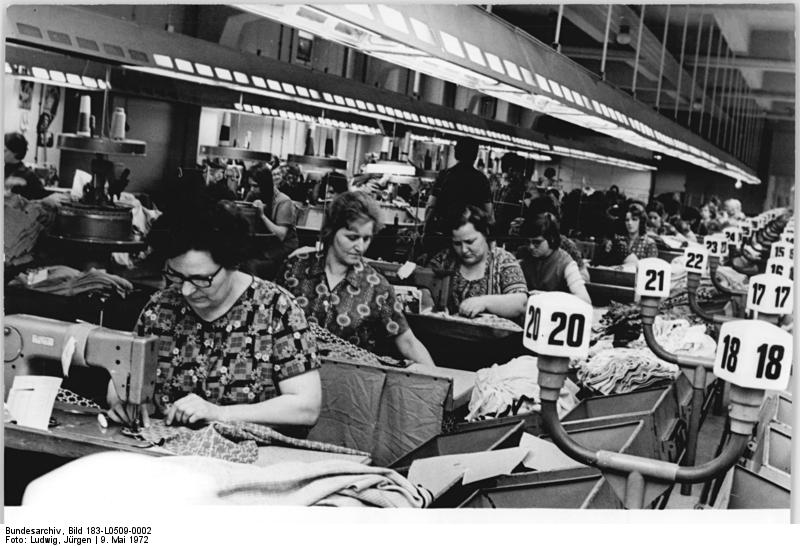 ADN-ZB-Ludwig-9.5.1972-la-Bez. Erfurt: Wettbewerbsinitiativen für Produktion pflegeleichter Obertrikotagen-Die Werktätigen der um den Staatstitel kämpfenden Brigade "21. Jahrestag" des VEB Thüringer Obertrikotagenkombinat Apolda haben in den ersten vier Monaten dieses Jahres in der zentralen Zuschneiderei die Teile für 33.000 Stück Obertrikotagen zusätzlich zugeschnitten. Das heißt bessere Versorgung der Bevölkerung mit pflegeleichten Pullovern, Jacken und Kleidern. Durch Großlagenzuschnitt und genaues Kalkulieren der einzelnen Schnitte wollen sie im Wettbewerb die Materialverluste um durchschnittlich acht Prozent senken. (vergl. L0509-1N)